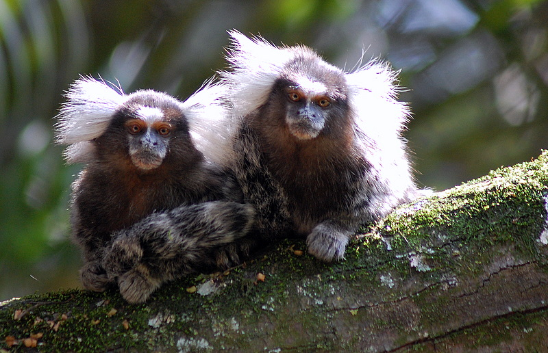 Parque Burle Marx em São Paulo